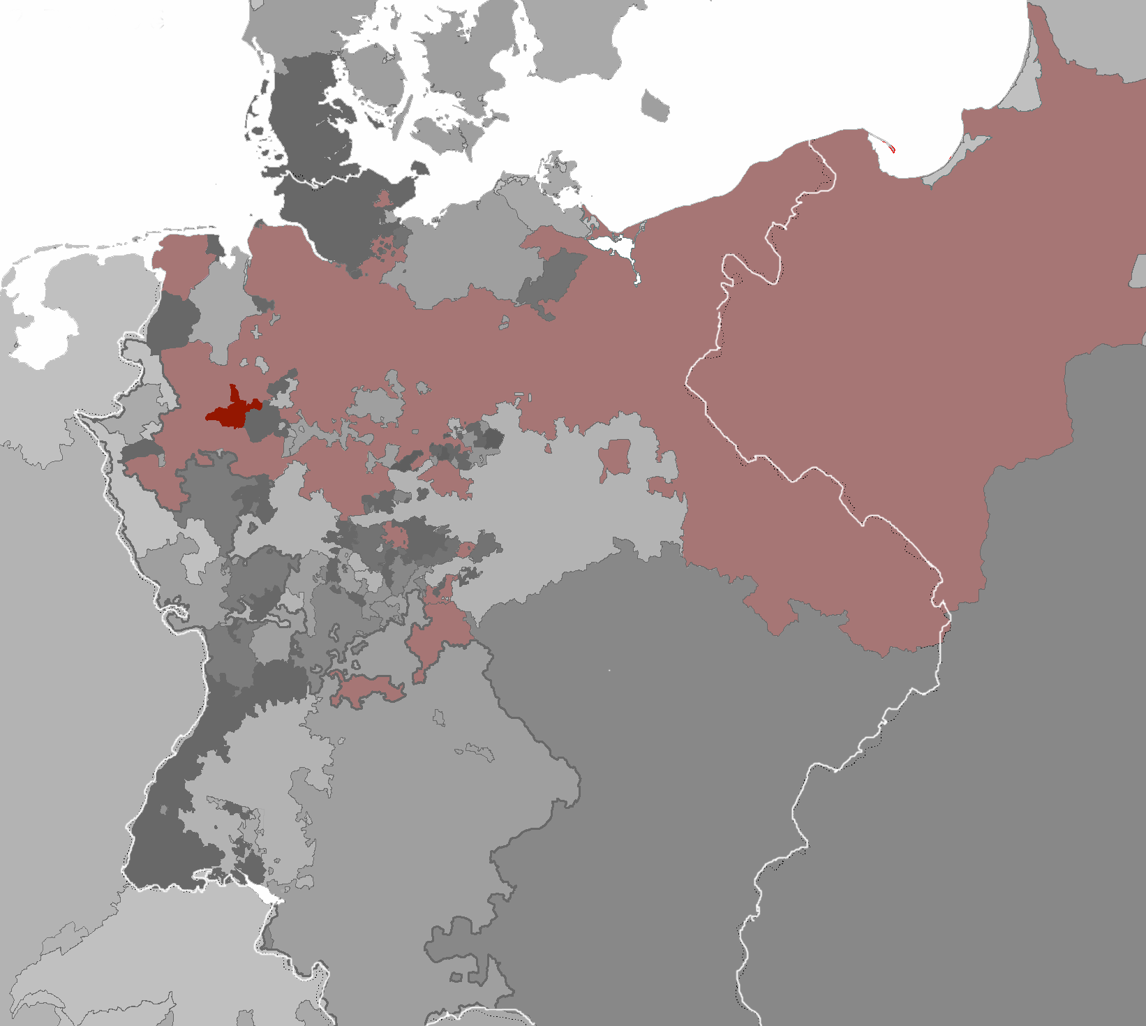 Grafschaft Ravensberg within Prussia (light red area) as of 1806.